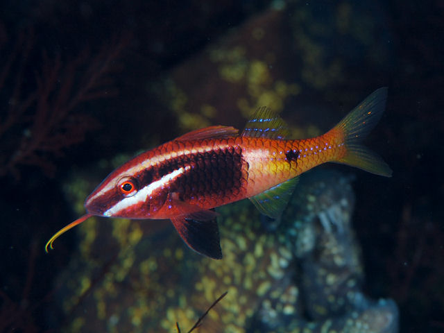 インドヒメジ Parupeneus barberinoides